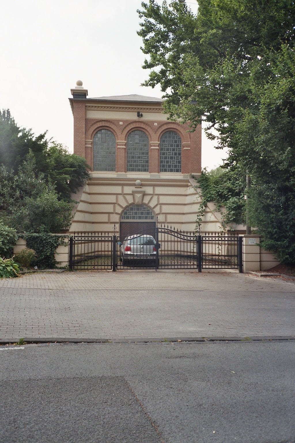 Wasserbehälter der Stadtwerke Bochum, Deutschland